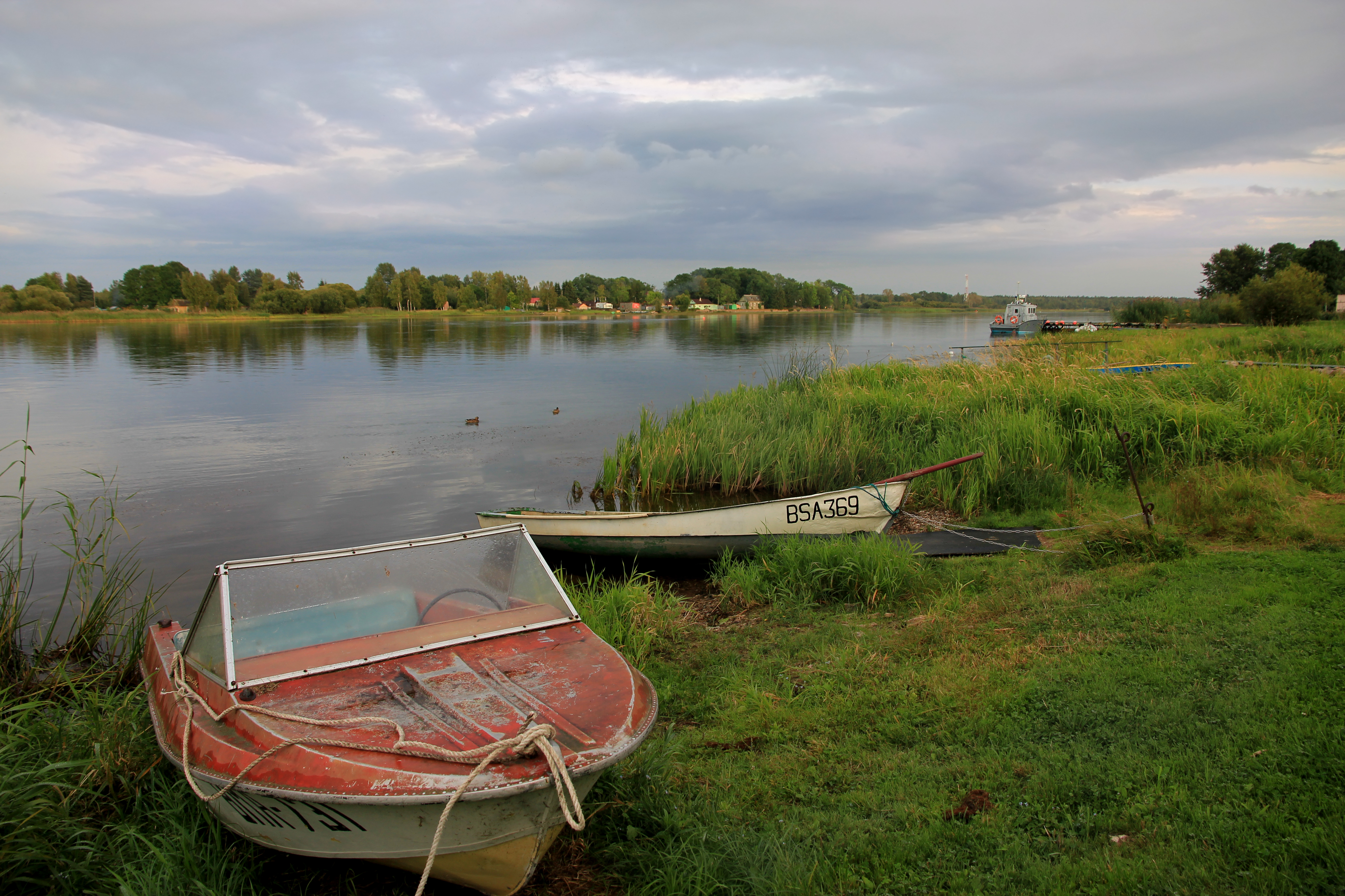 Vasknarva paadisadam